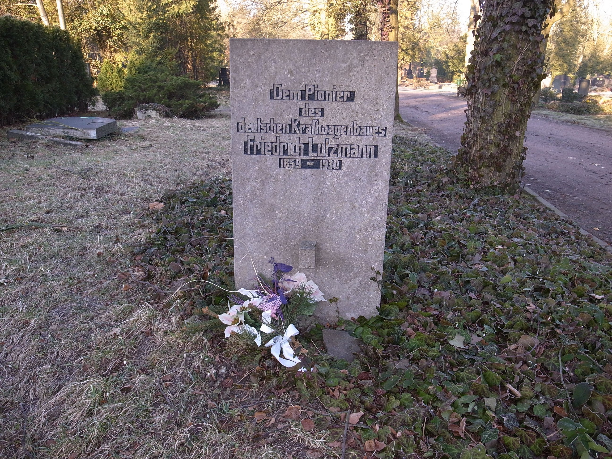 Friedrich Lutzmann, Grabstein in Dessau